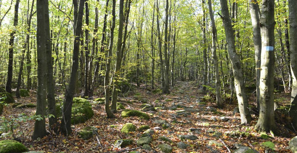 Gjennom Veldre naturminne går en blåmerket tursti på runde morenesteiner.